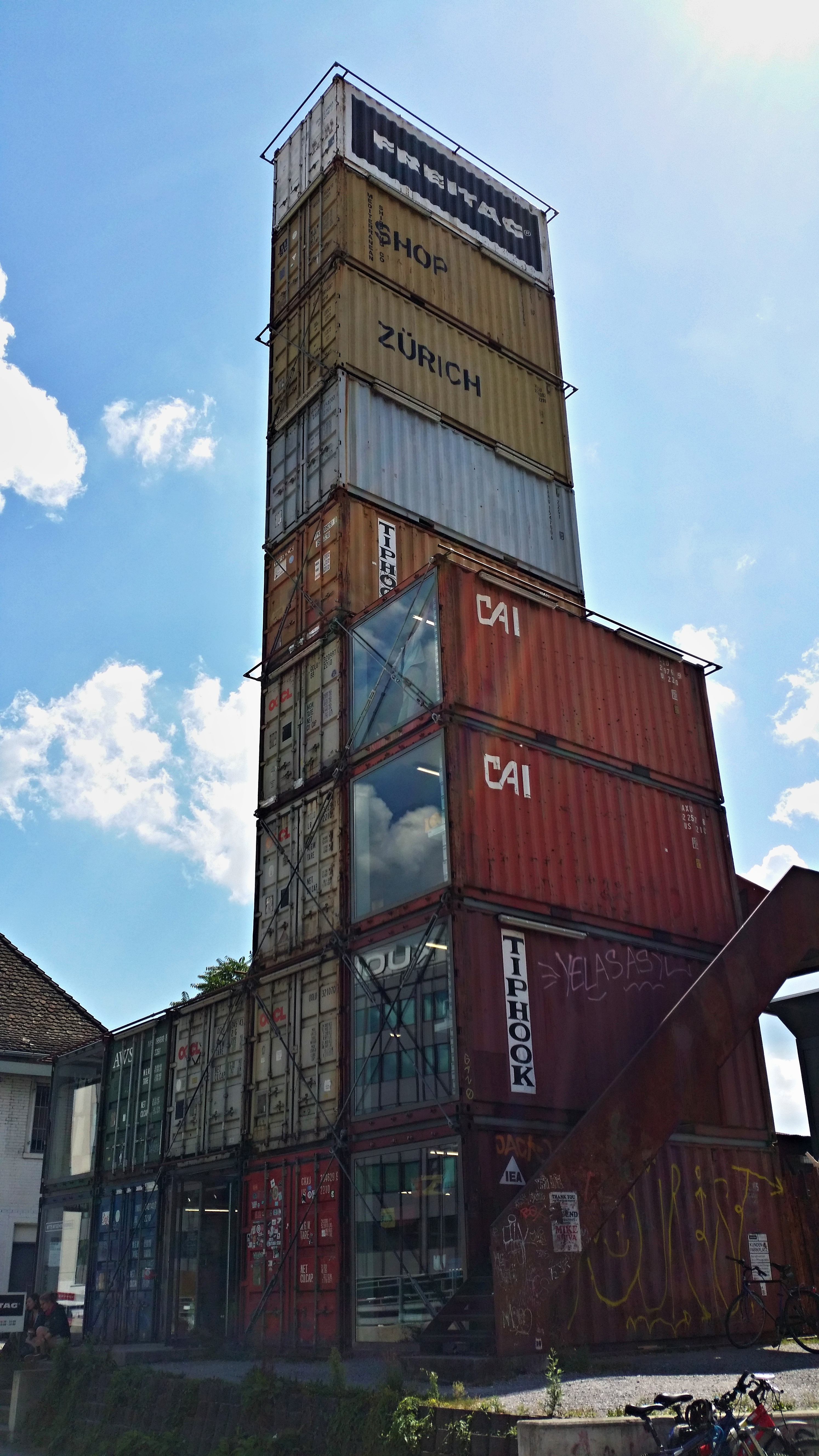 Freitag Tower